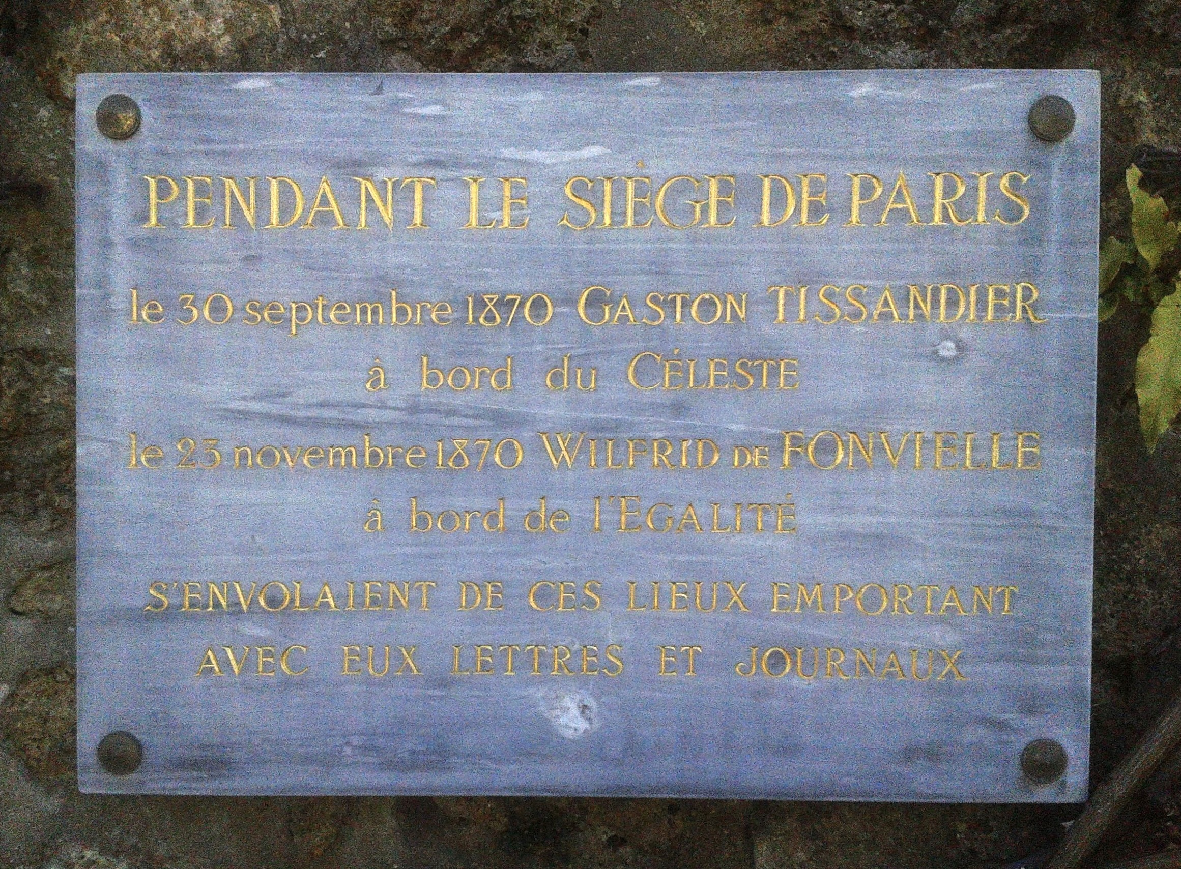 Ascencion de Gastion Tissandier - Square Saint Lambert